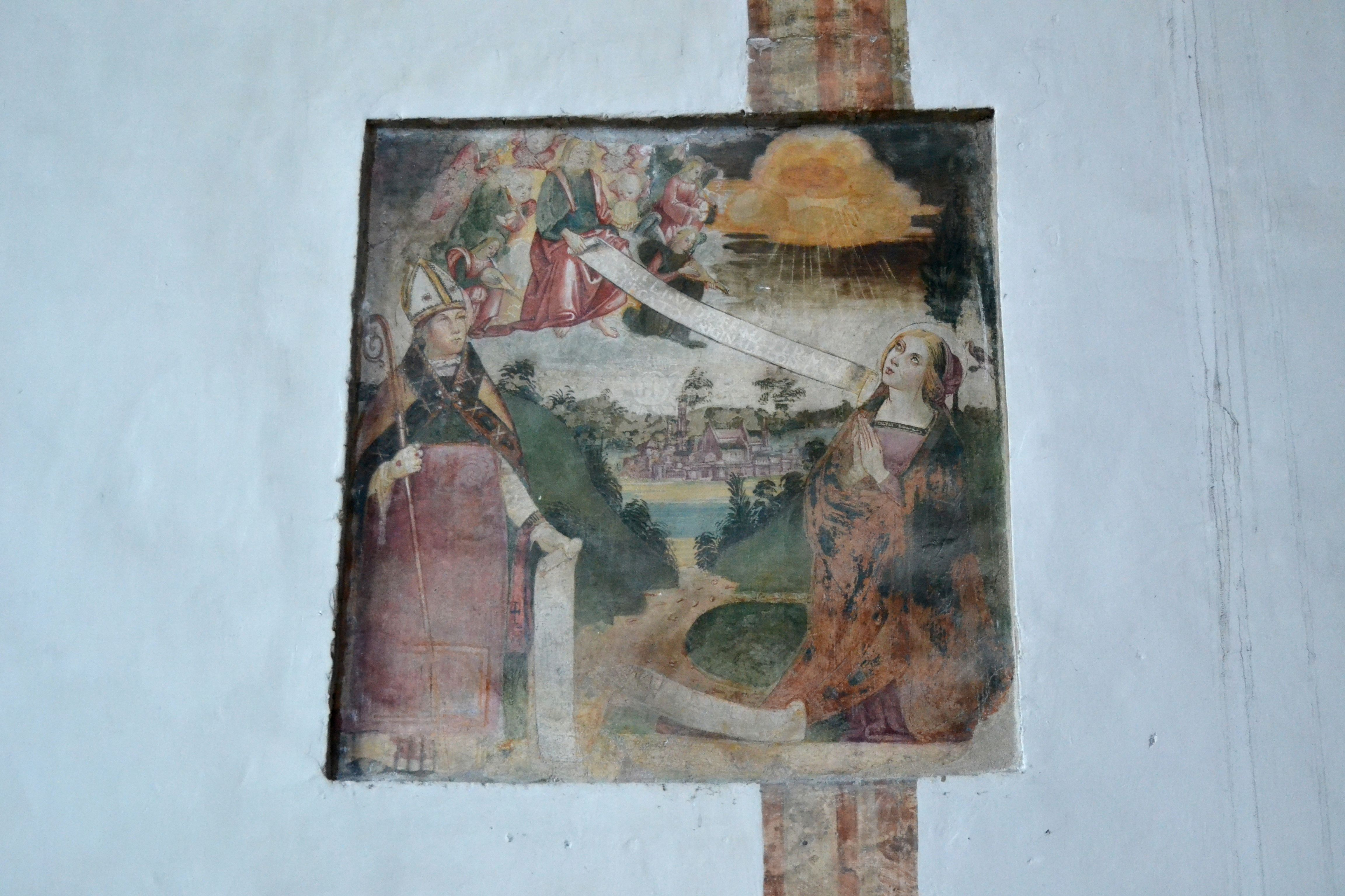 Chiesa di Santa Maria Donnaregina Vecchia (Napoli) - Coro delle monache: Affresco sulla parete occidentale